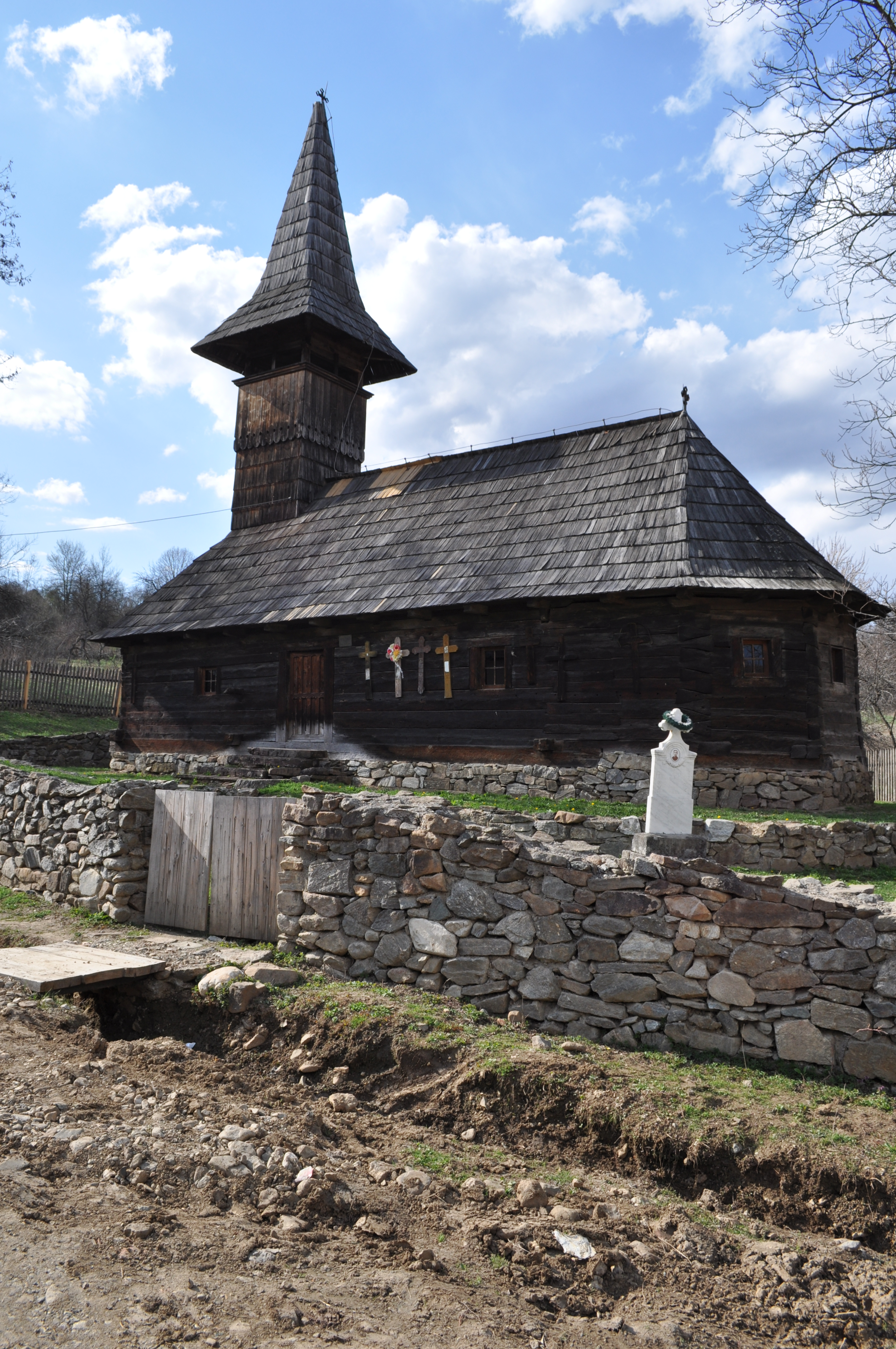 Biserica de lemn "Întâmpinarea Domnului", sat GROŞII NOI; comuna BÂRZAVA